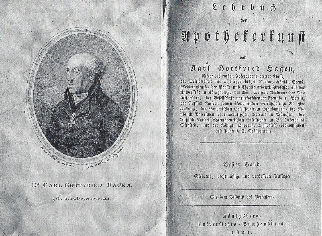 VI.3. K. G. Hagen: Lehrbuch der Apothekerkunst, Königsberg.